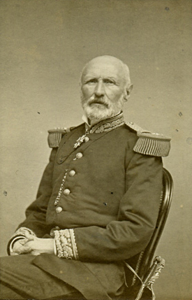 Adolphe-Charles Le Flô (* 2. November 1804 in Lesneven, Département Finistère; † 16. November 1887 in Néchoat bei Morlaix) war ein französischer General und Staatsmann.